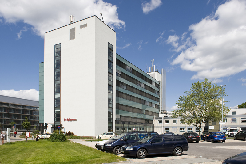 Universitätsklinikum Bonn, Bettenhaus 1